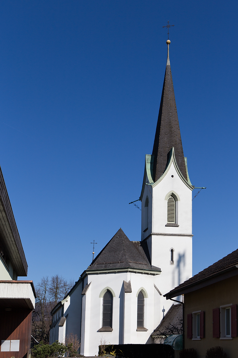 Römisch-katholische Pfarrkirche St.Gallus und Othmar in Kaiseraugst (AG)